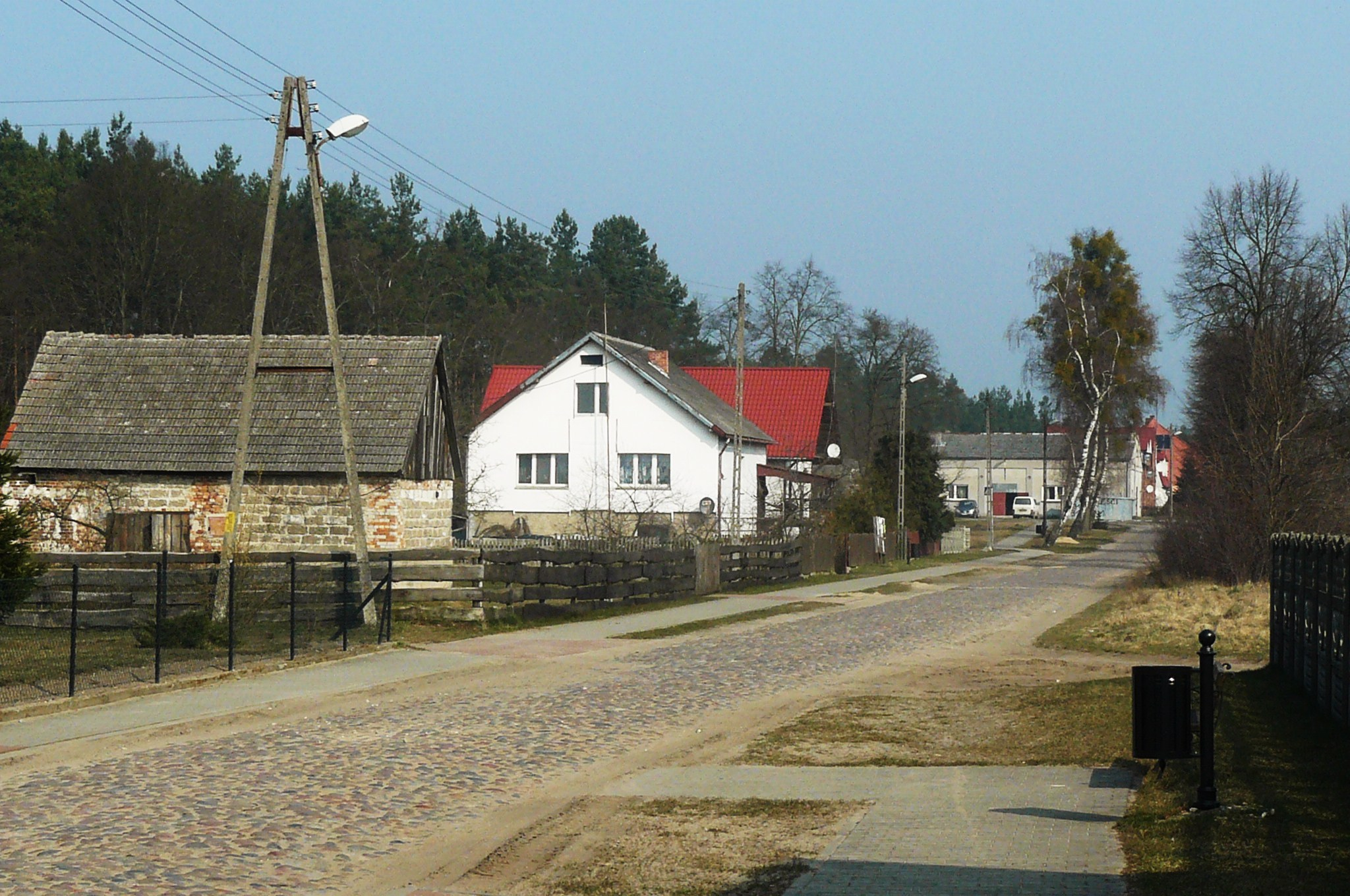 Stare Bielice.